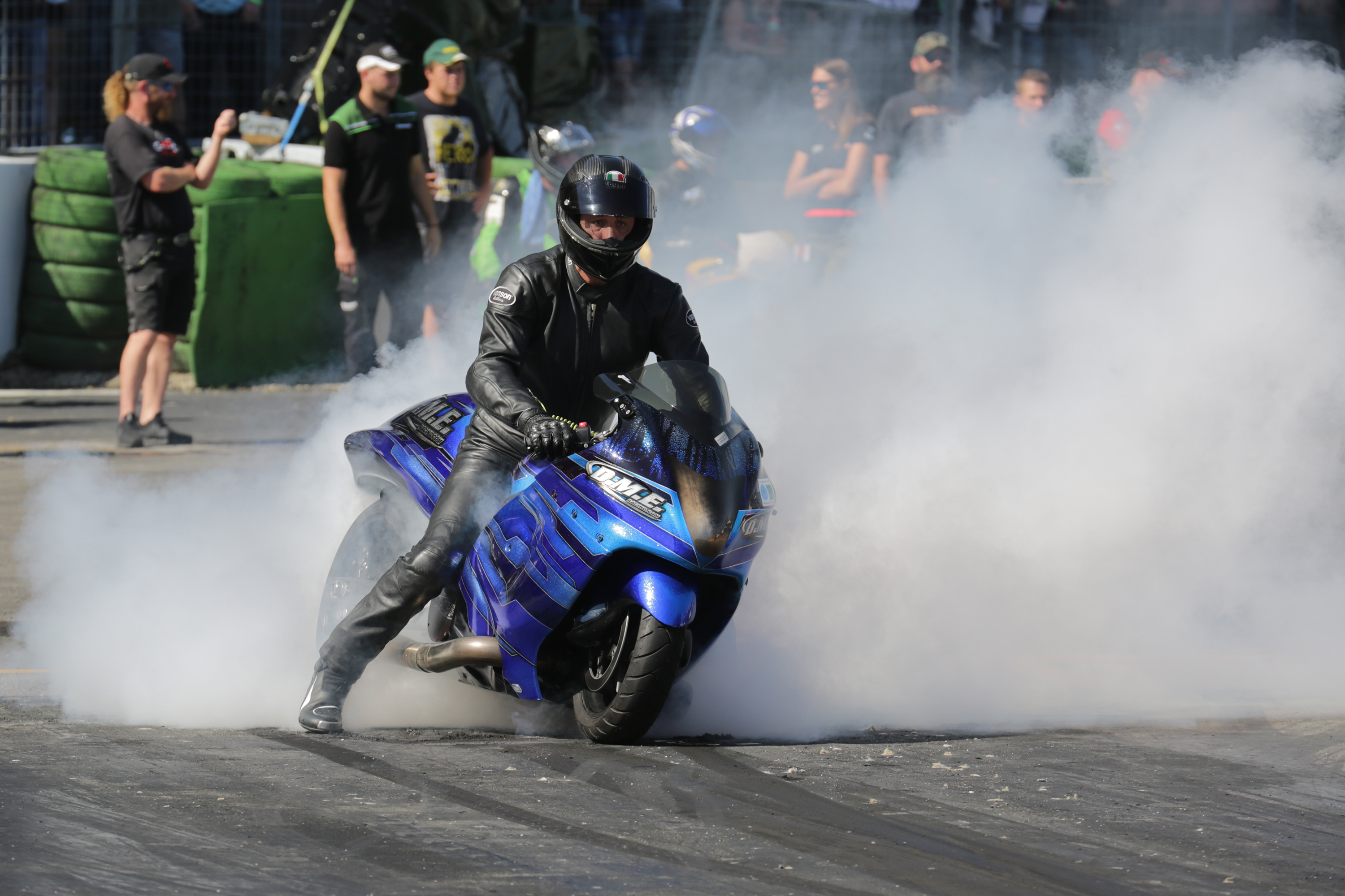 FIM Super Street Bike Steve Venables (GBR) Nitrolympx 2019 / Burnout